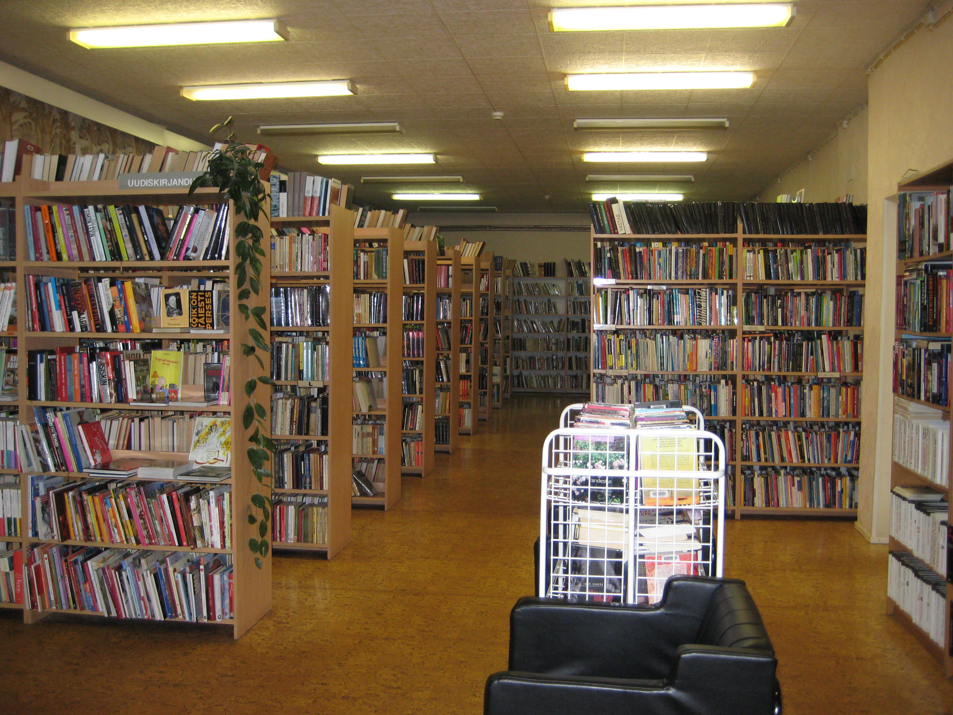 Jõgeva Linnaraamatukogu sisevaade